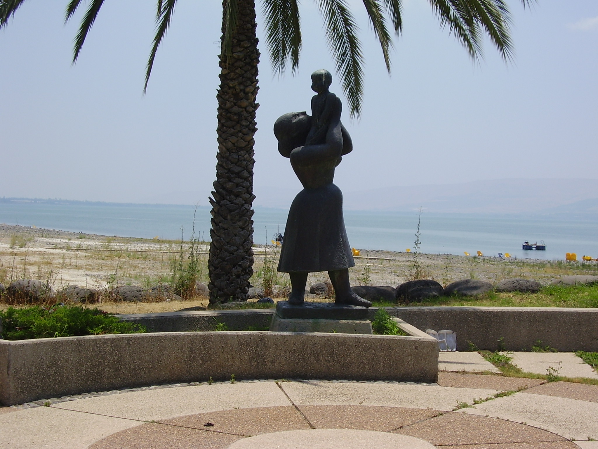 statue:mother and her child by chana orloff in kibutz Ein-Gev, Israel